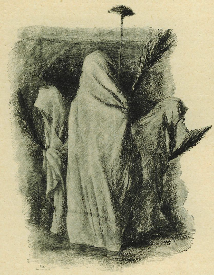 «Три короля». Седлчаны, Чехия